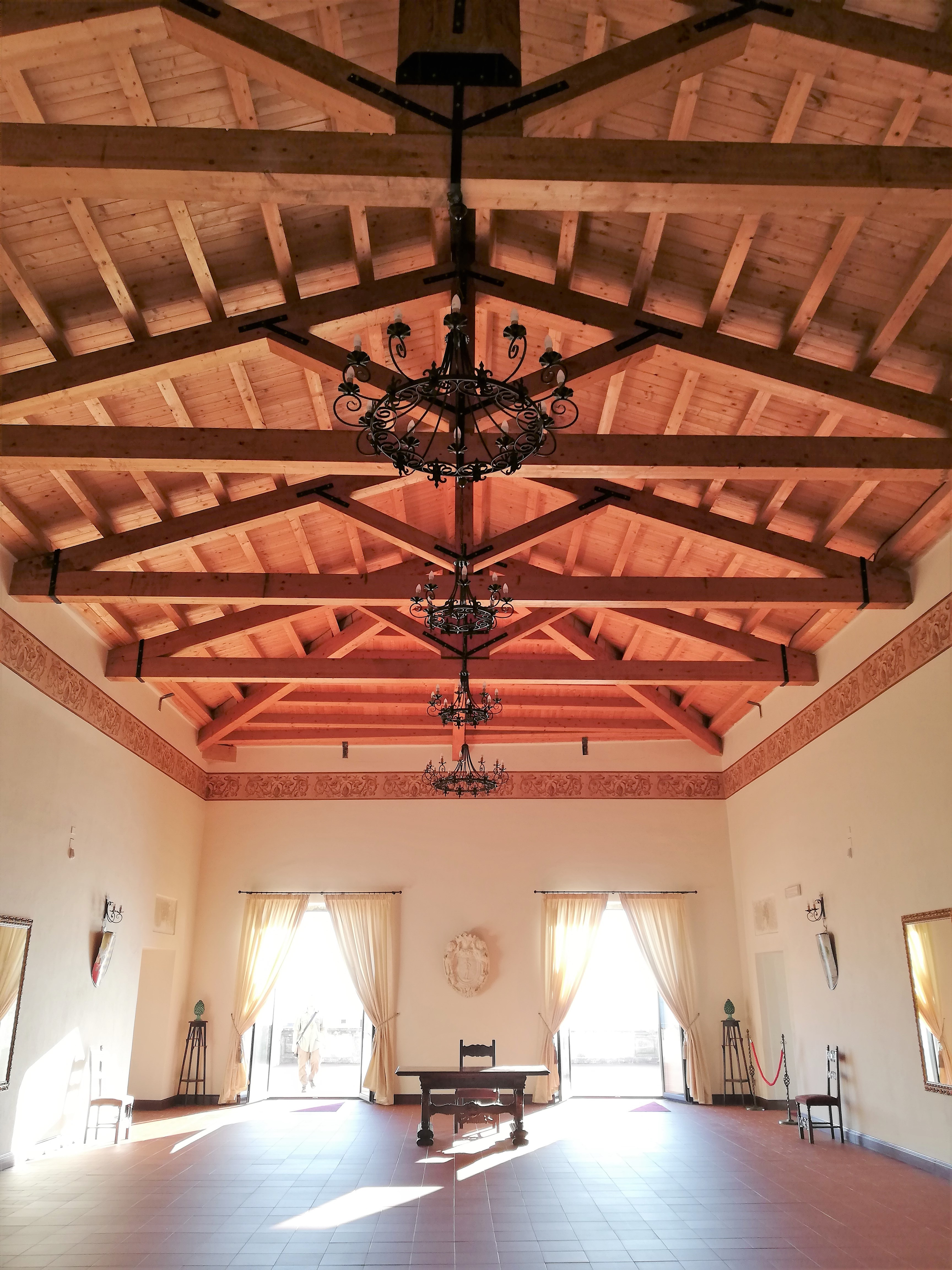 Salone delle Armi.